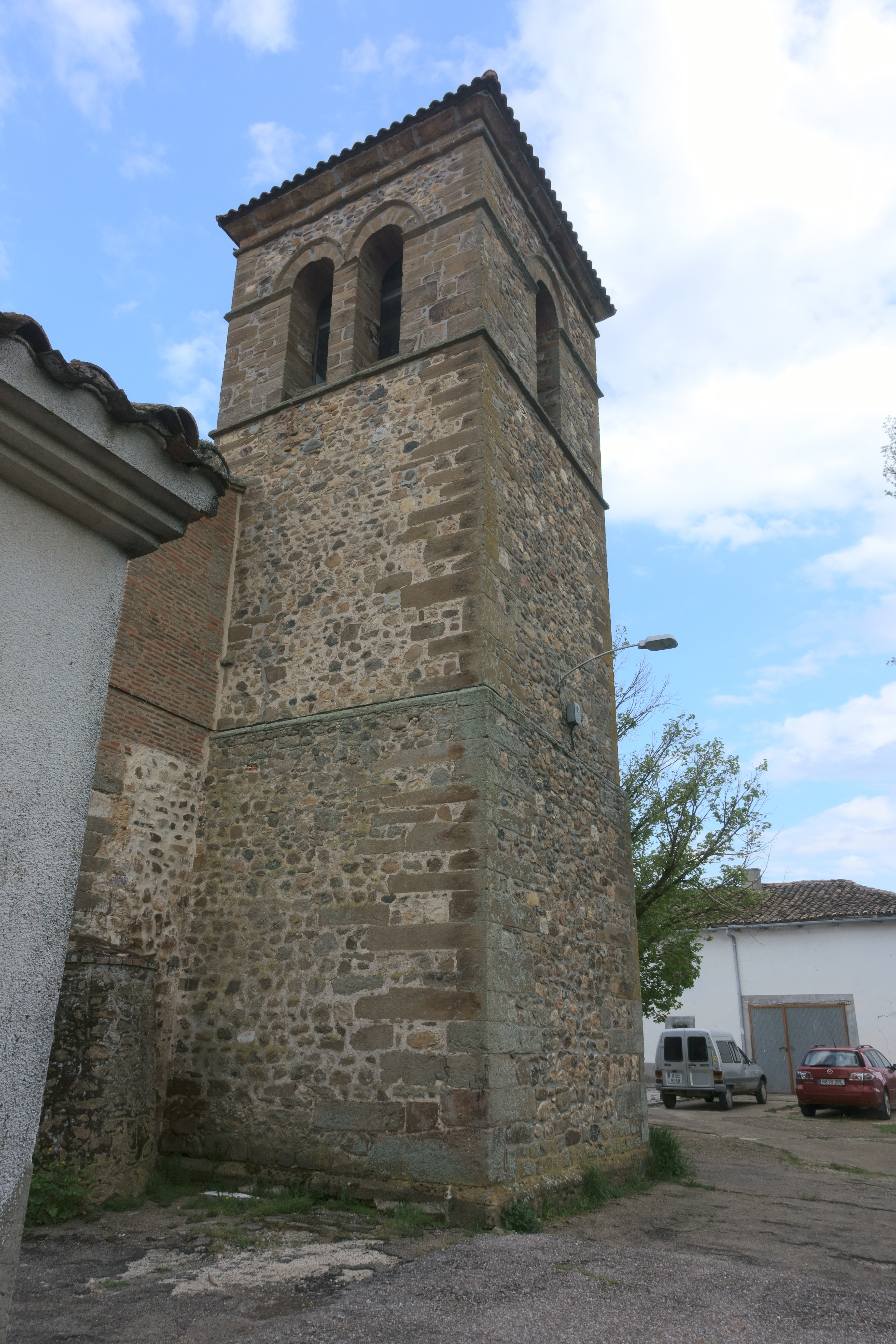 Iglesia de San Juan Bautista, Fresno del Río (Palencia, España).